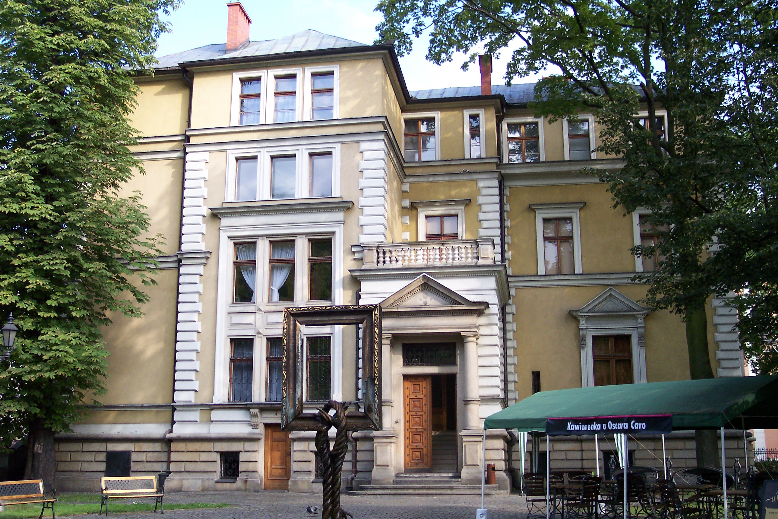 Willa Caro w Gliwicach